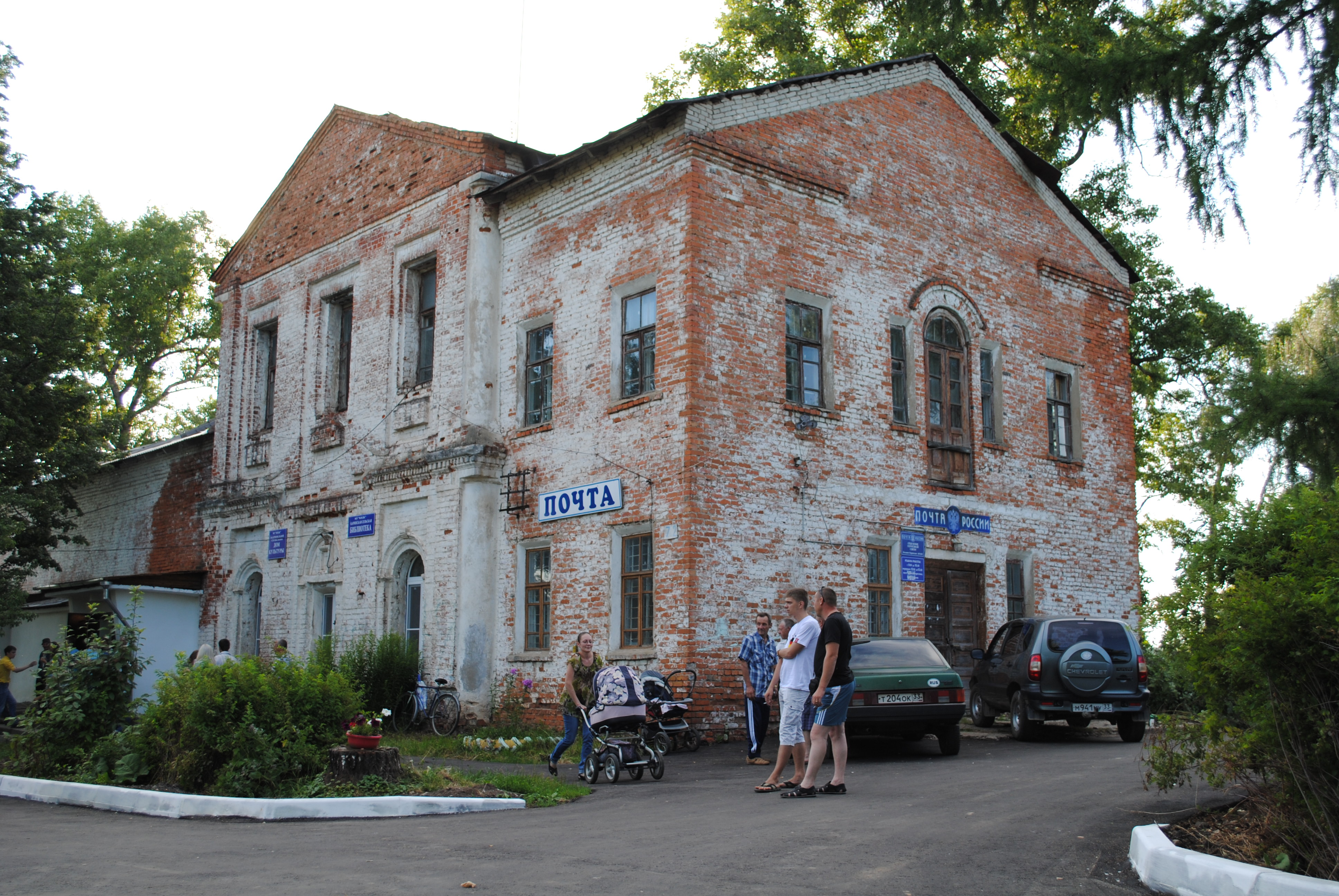 Церковь Усекновения главы Иоанна Предтечи: Большое Каринское, Александровский район, Владимирская область